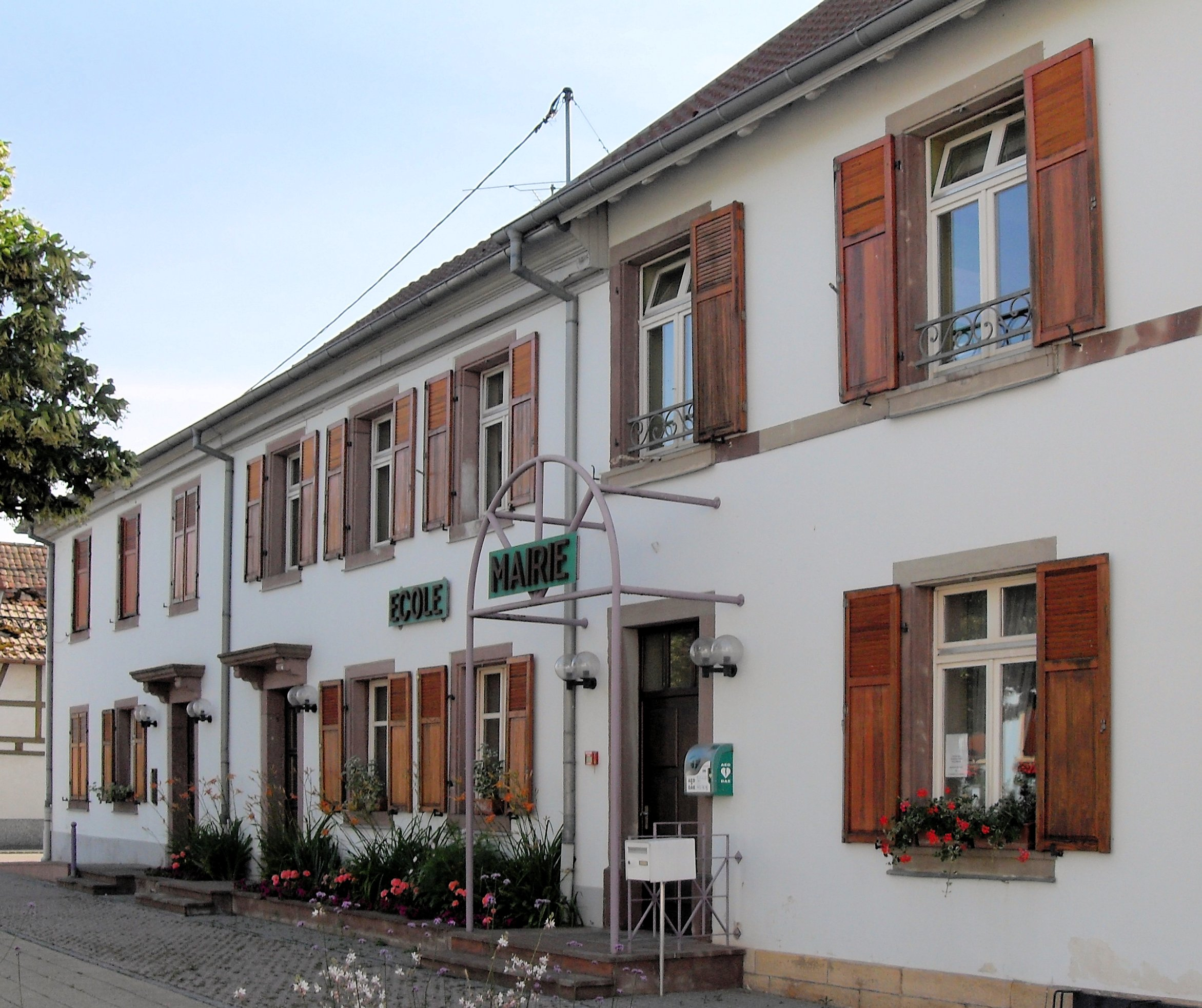 La mairie et l'école de Munwiller